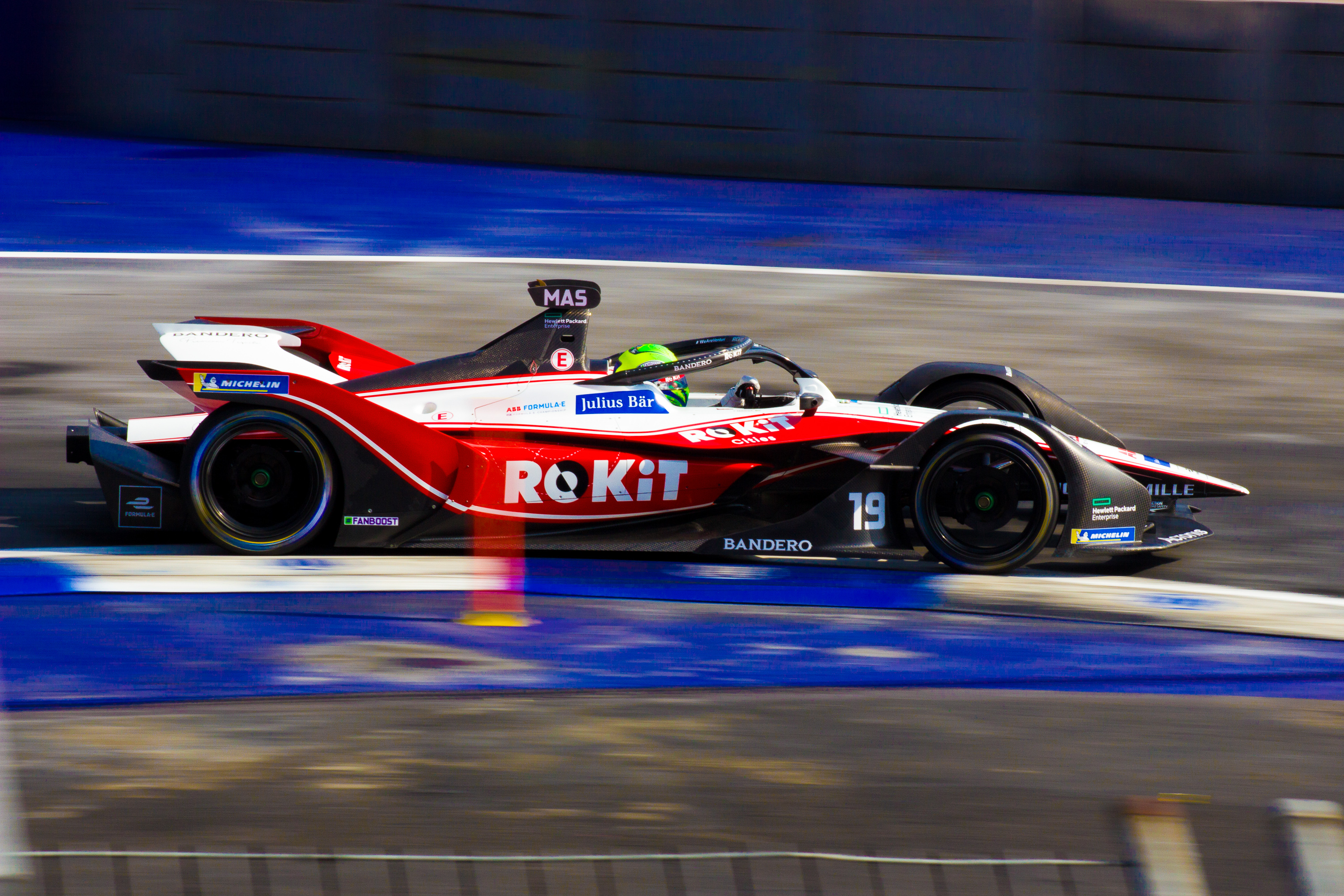 2019-20 FIA Formula E, CBMM Niobium Mexico City E-Prix 2020, Autódromo Hermanos Rodríguez, Ciudad de México, 15 de febrero 2020